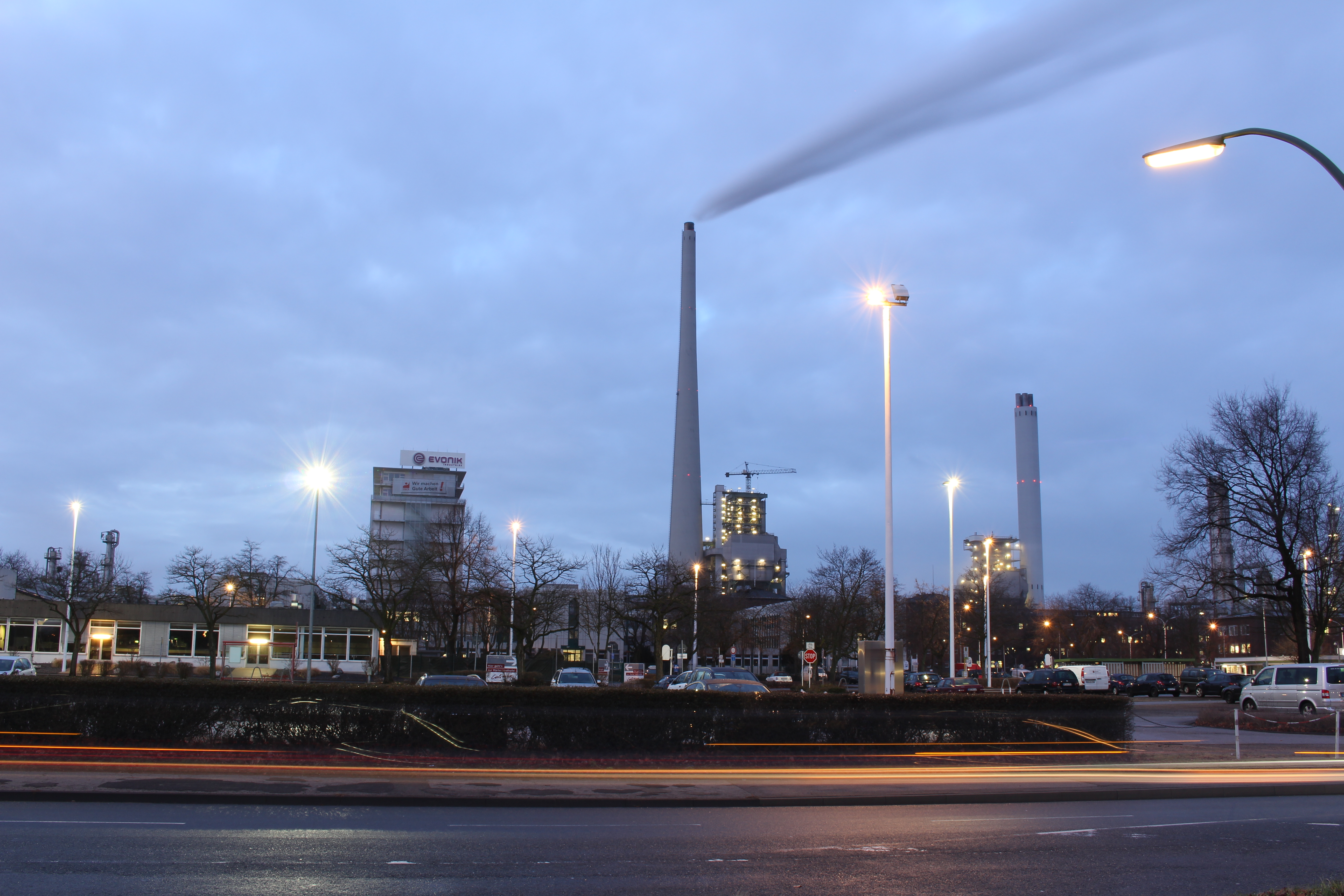 Chemische Werke Hüls - Südansicht zur blauen Stunde